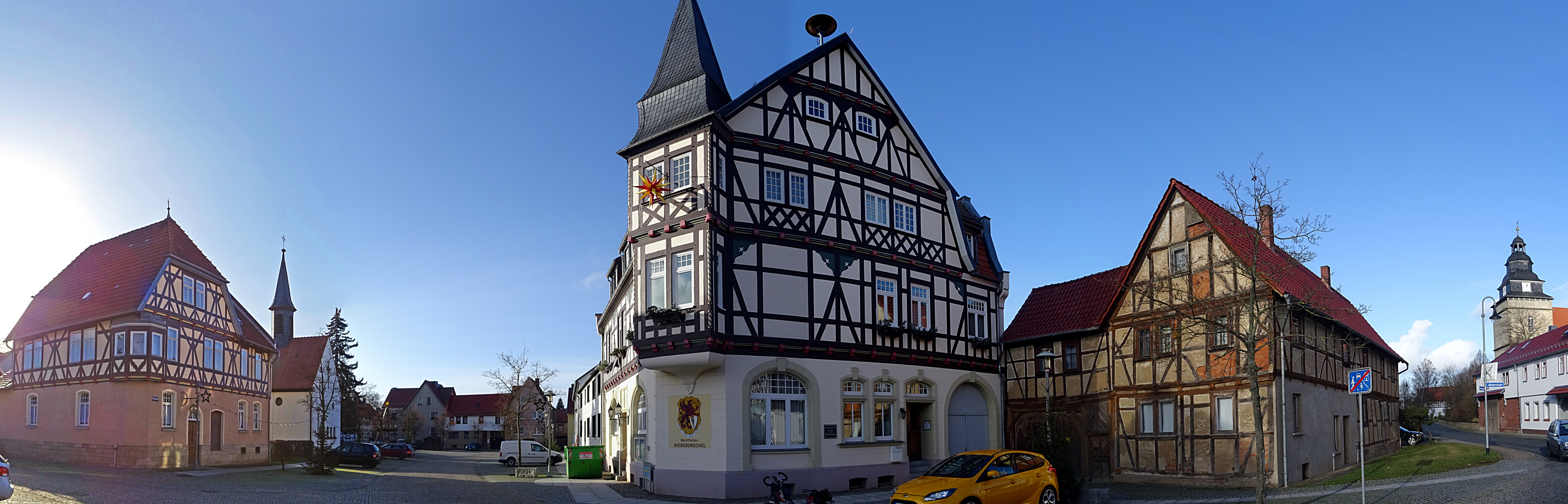 Niederorschel im Eichsfeld